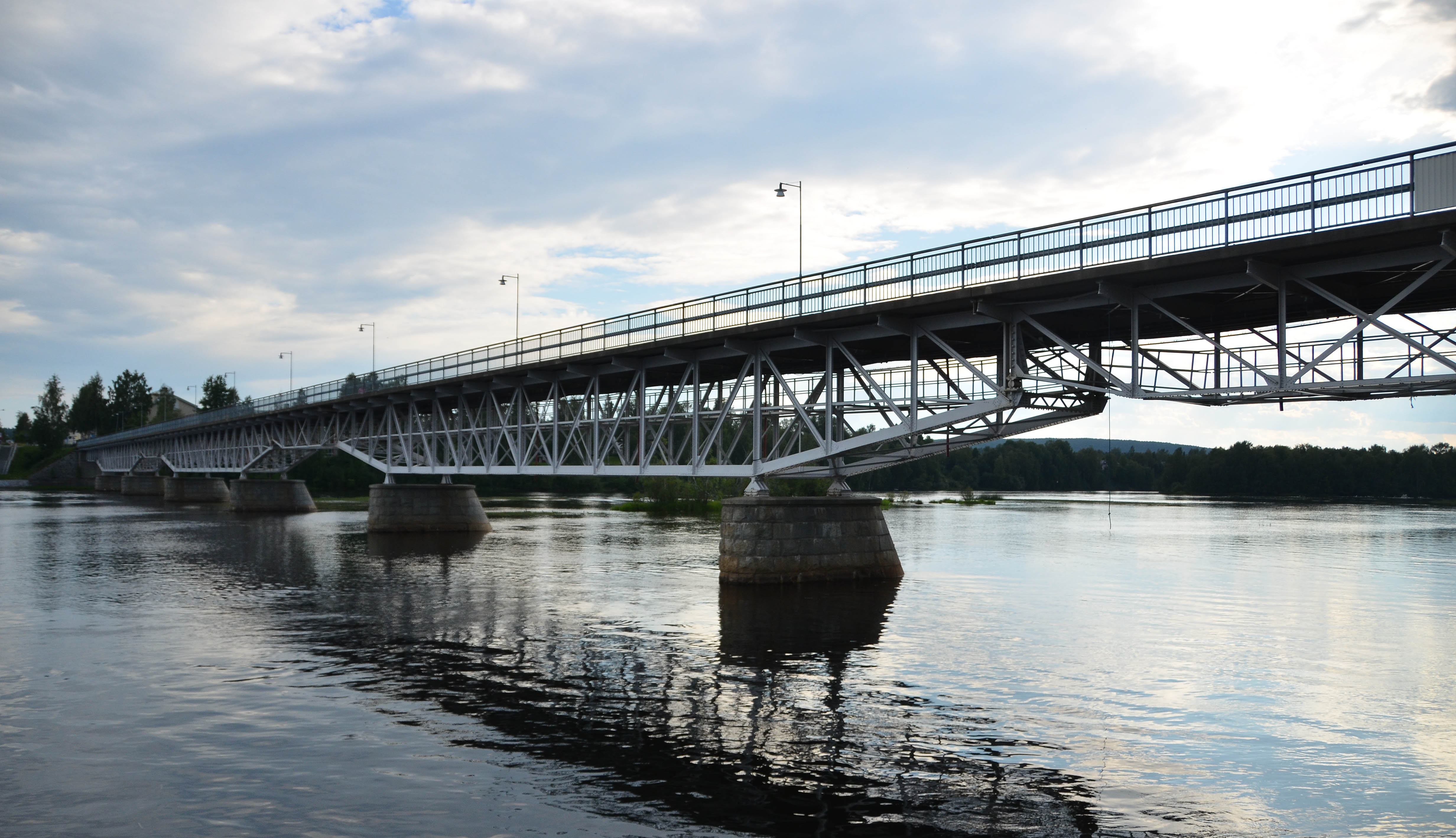 Parkbron i Skellefteå.